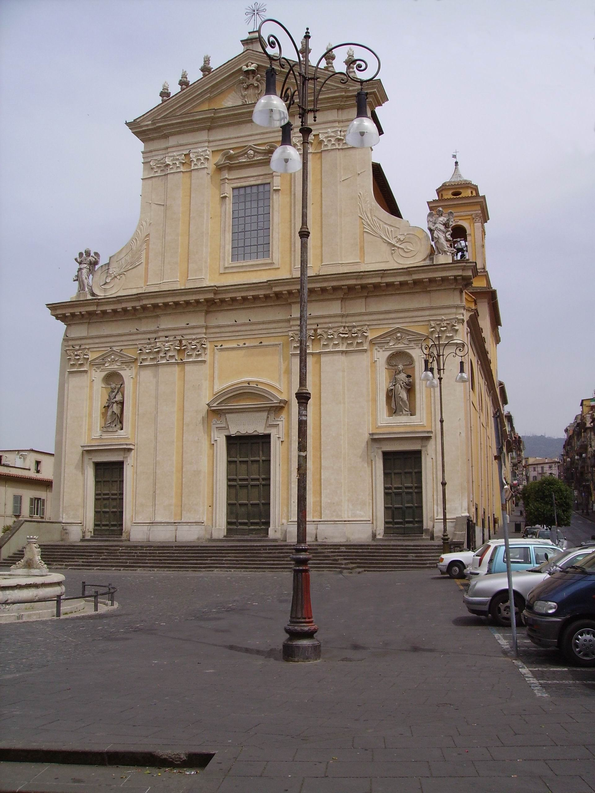 Facciata Basilica di San Barnaba